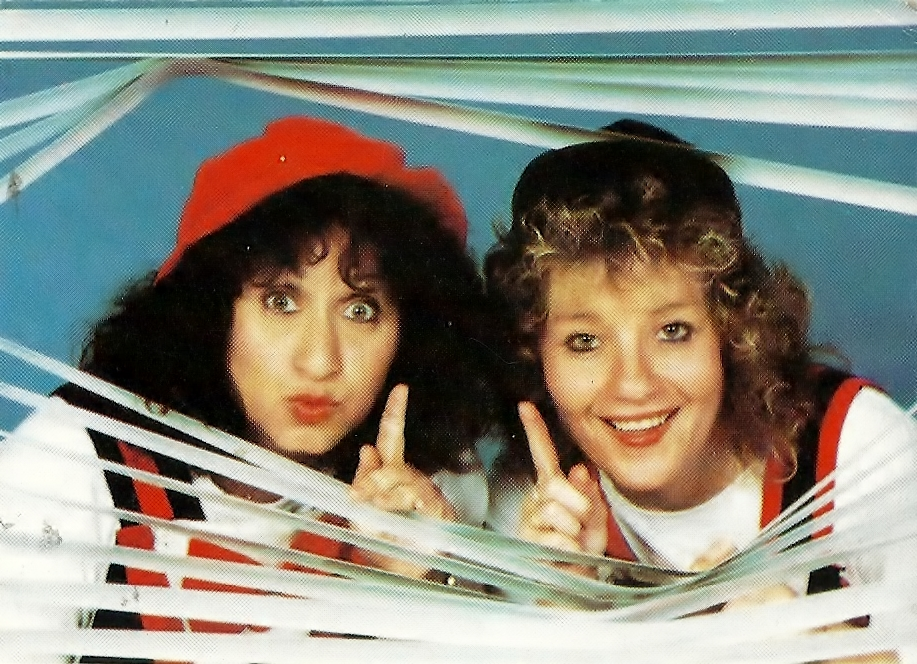 הצמד רגע וגלי עם גלה ישי וציפי מור